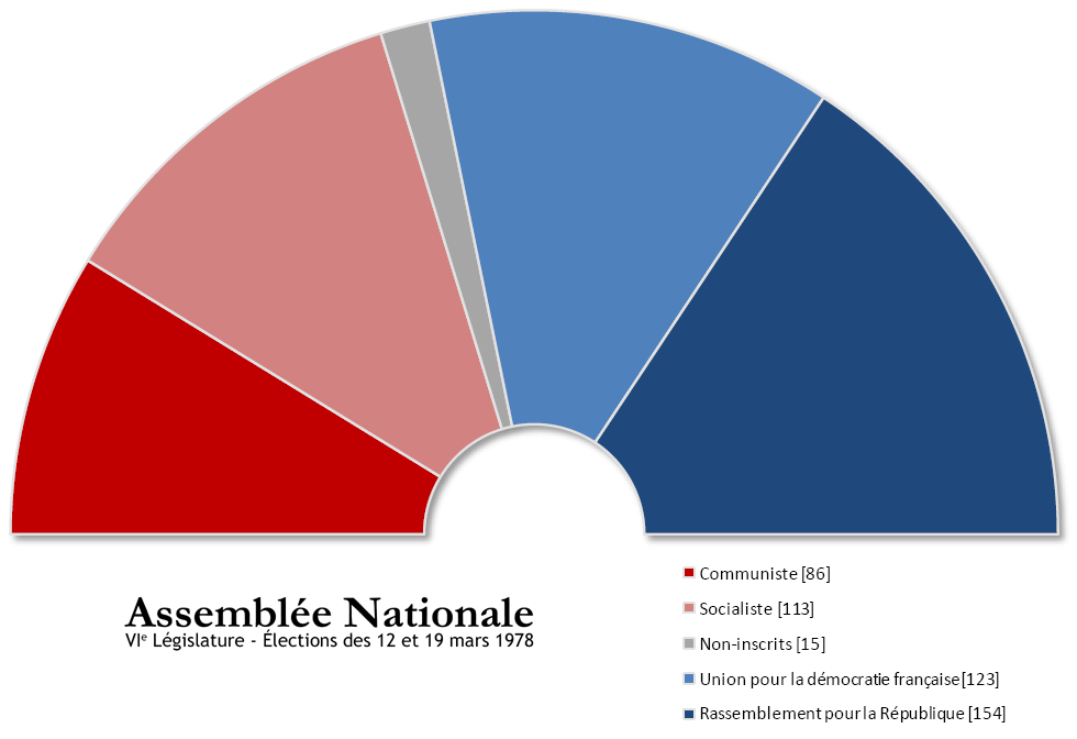 Assemblée Nationale française issue des élections de juin 1978